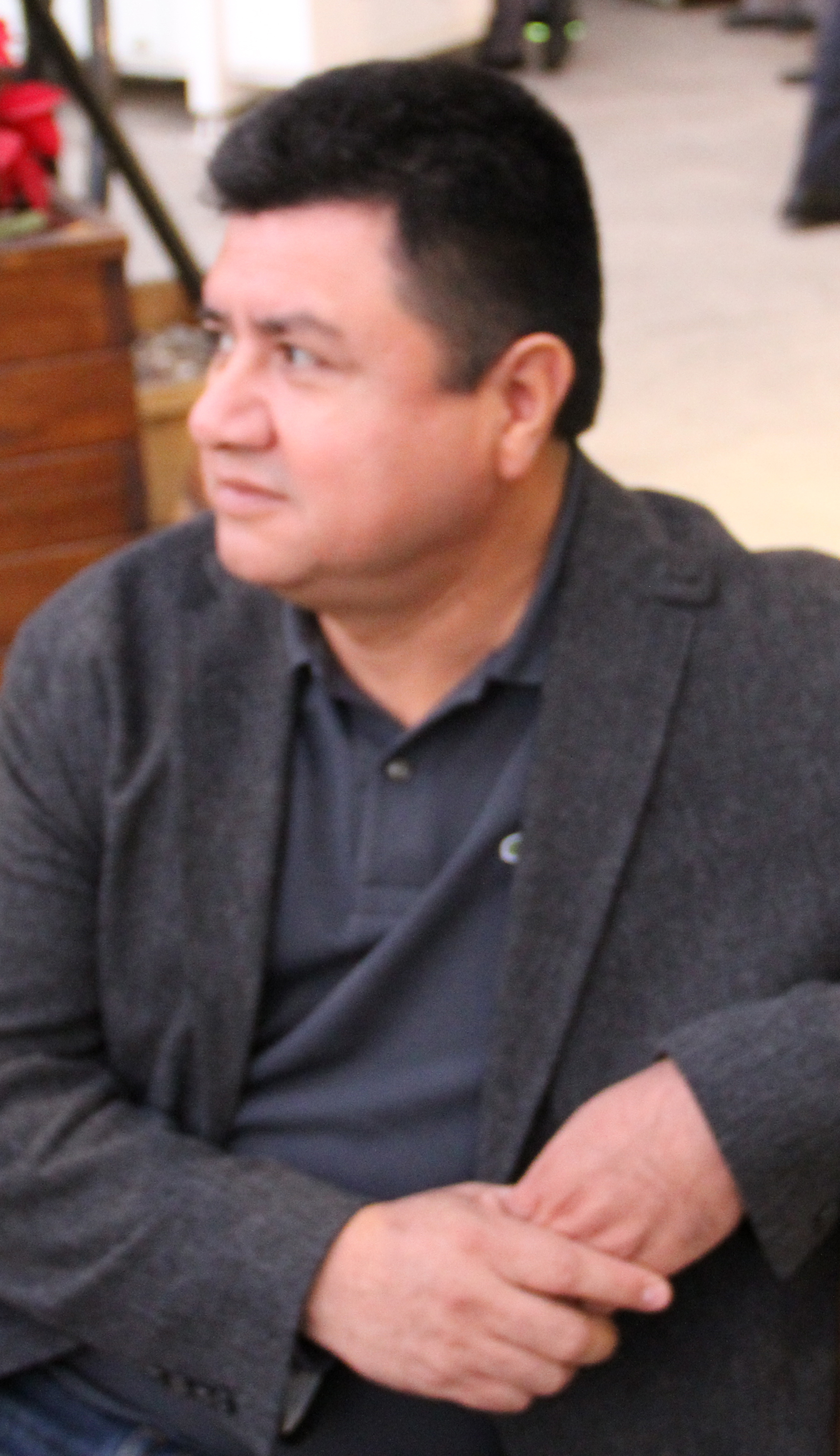 Ramon Gallegos Nava